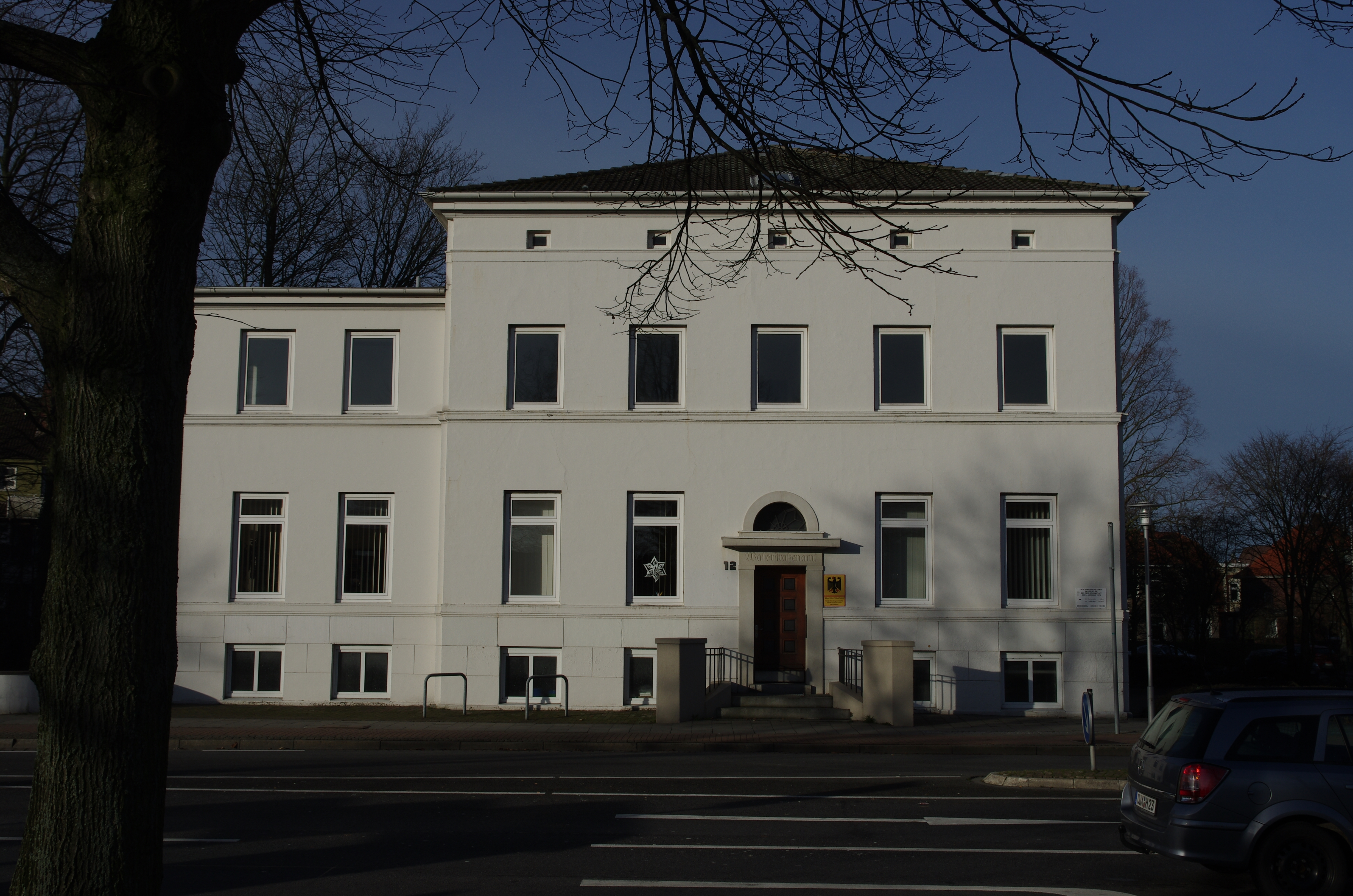 Cuxhaven in Niedersachsen. Das Haus Deichstraße 12 steht unter Denkmalschutz.